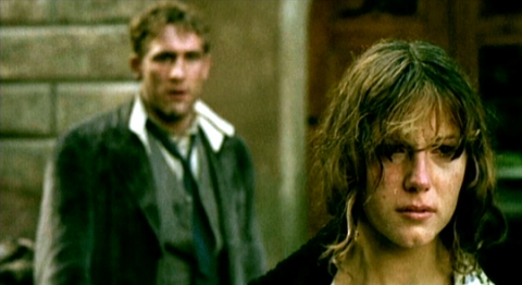 Screenshot del film Novecento (1976)